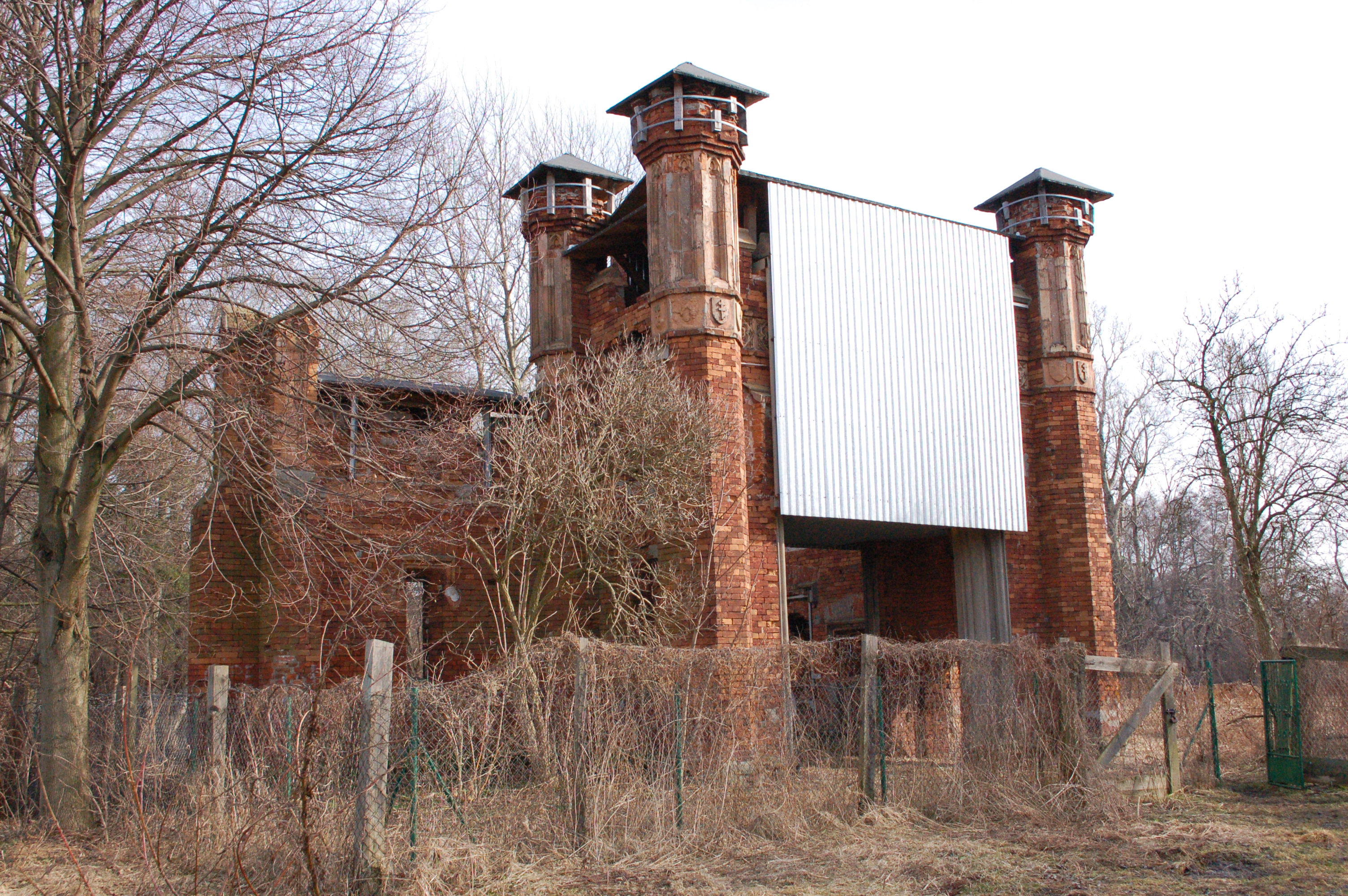 Wilanow-Park